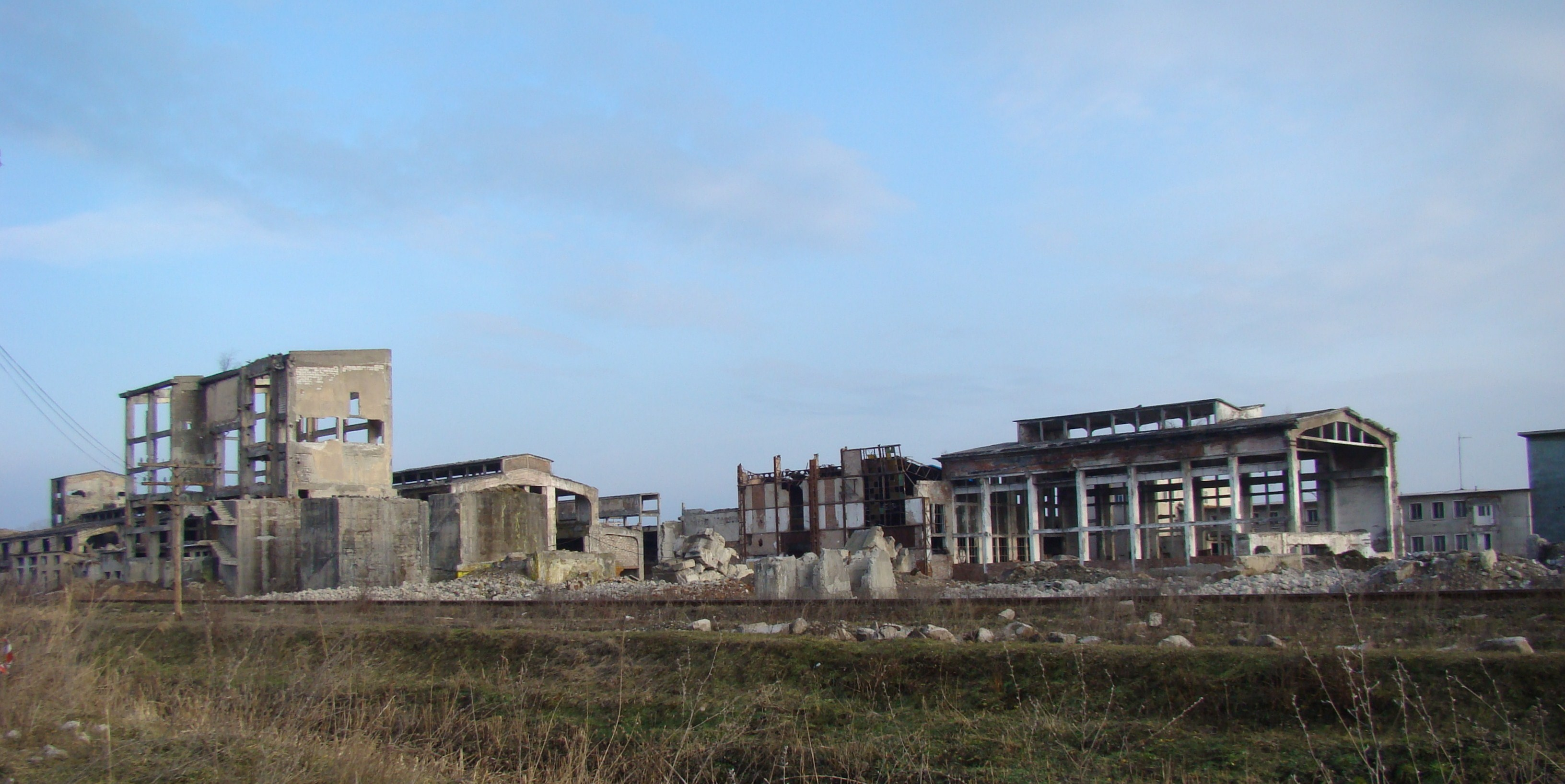 Ruinele Combinatului Chimic Târnăveni, județul Mureș